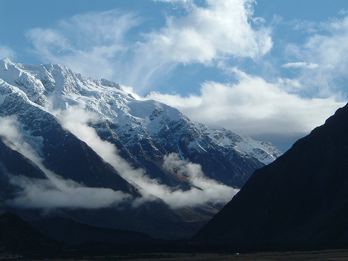 Monte Cook, en Nueva Zelanda. El Caradhras en las peliculas de El Señor de los Anillos